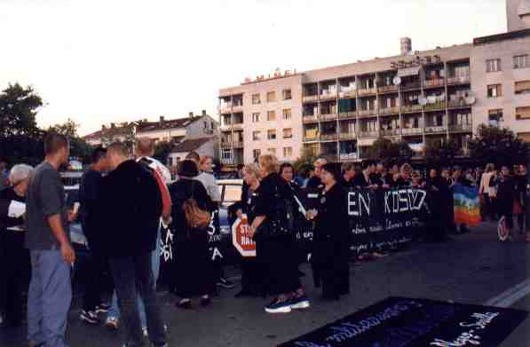 Ulcinj, Montenegro (1 octubre de 1999)